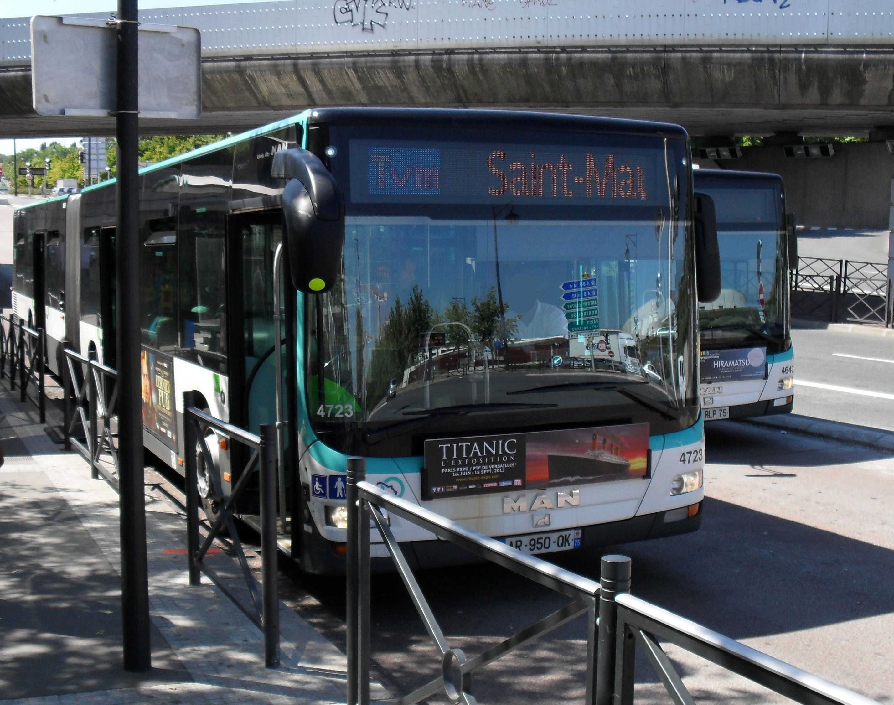 Deux bus Lion's City G à la gare de La Croix de Berny.